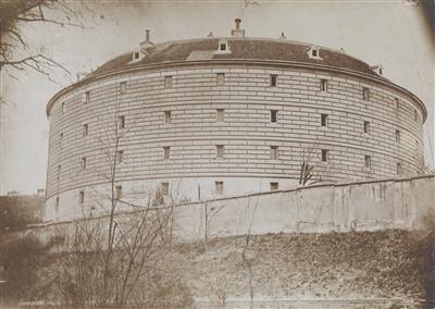 Narrenturm, um 1895, Kollodiumpapier, auf Orig.-Karton aufgezogen, auf der Rückseite mit Fotografenstempel